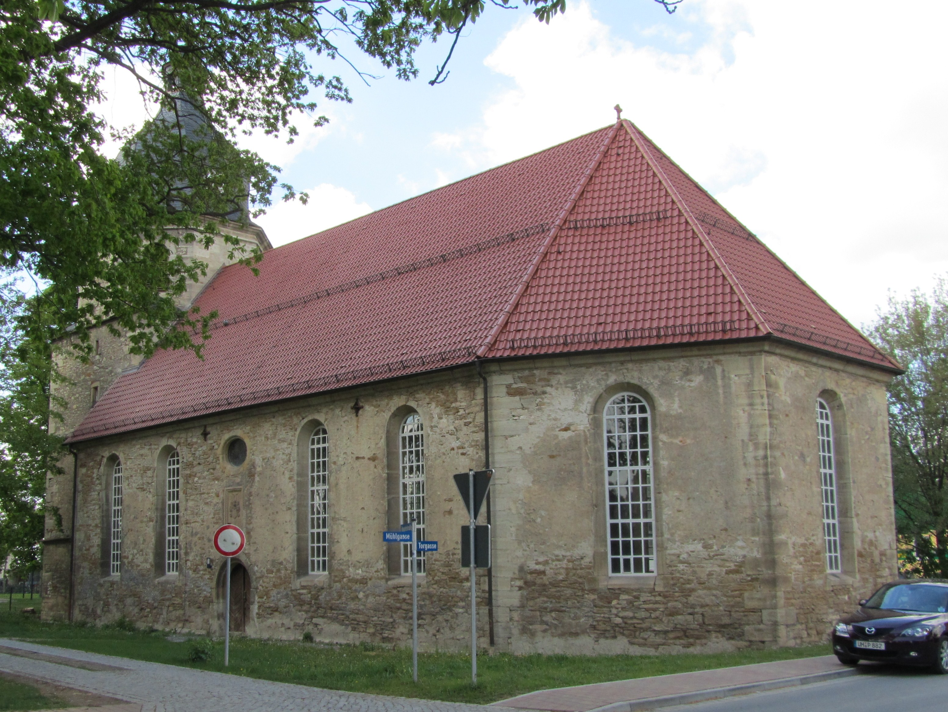 Die Trinitatiskirche in Altengottern (Thüringen).